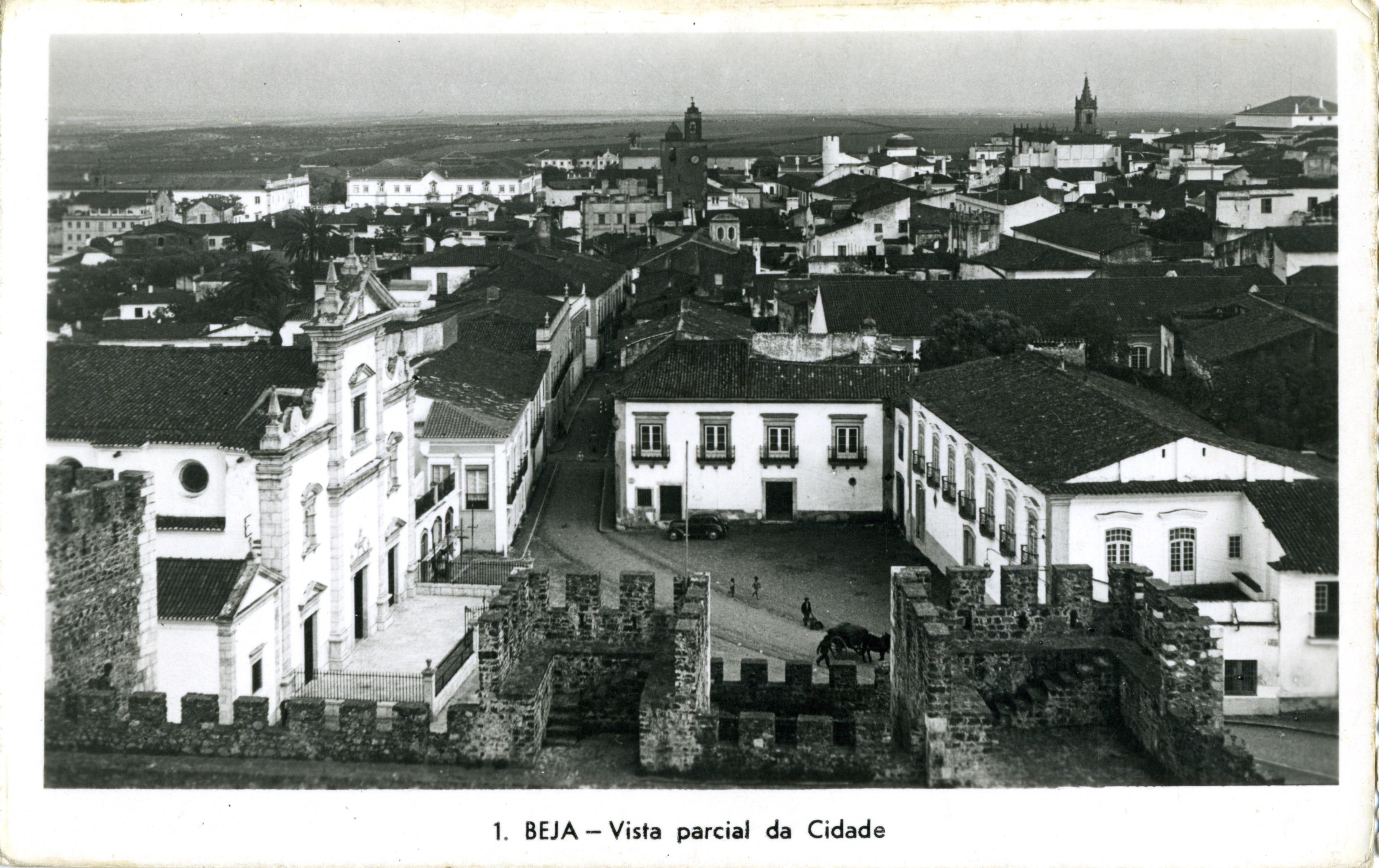 vue de Béja